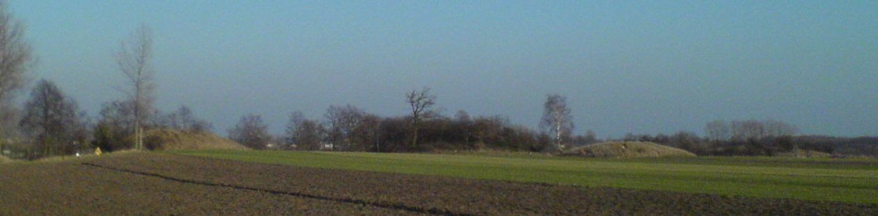 Kurhany - widok ogolny, Wielkopolskie kurhany